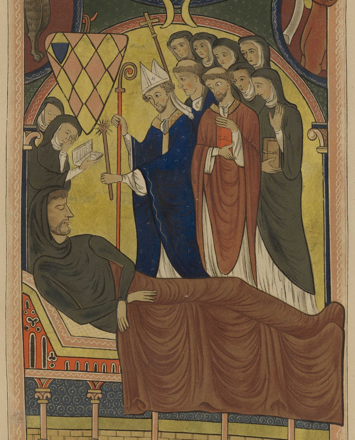 Détail d'un chromo de Guillaume II des Barres sur son lit de mort.